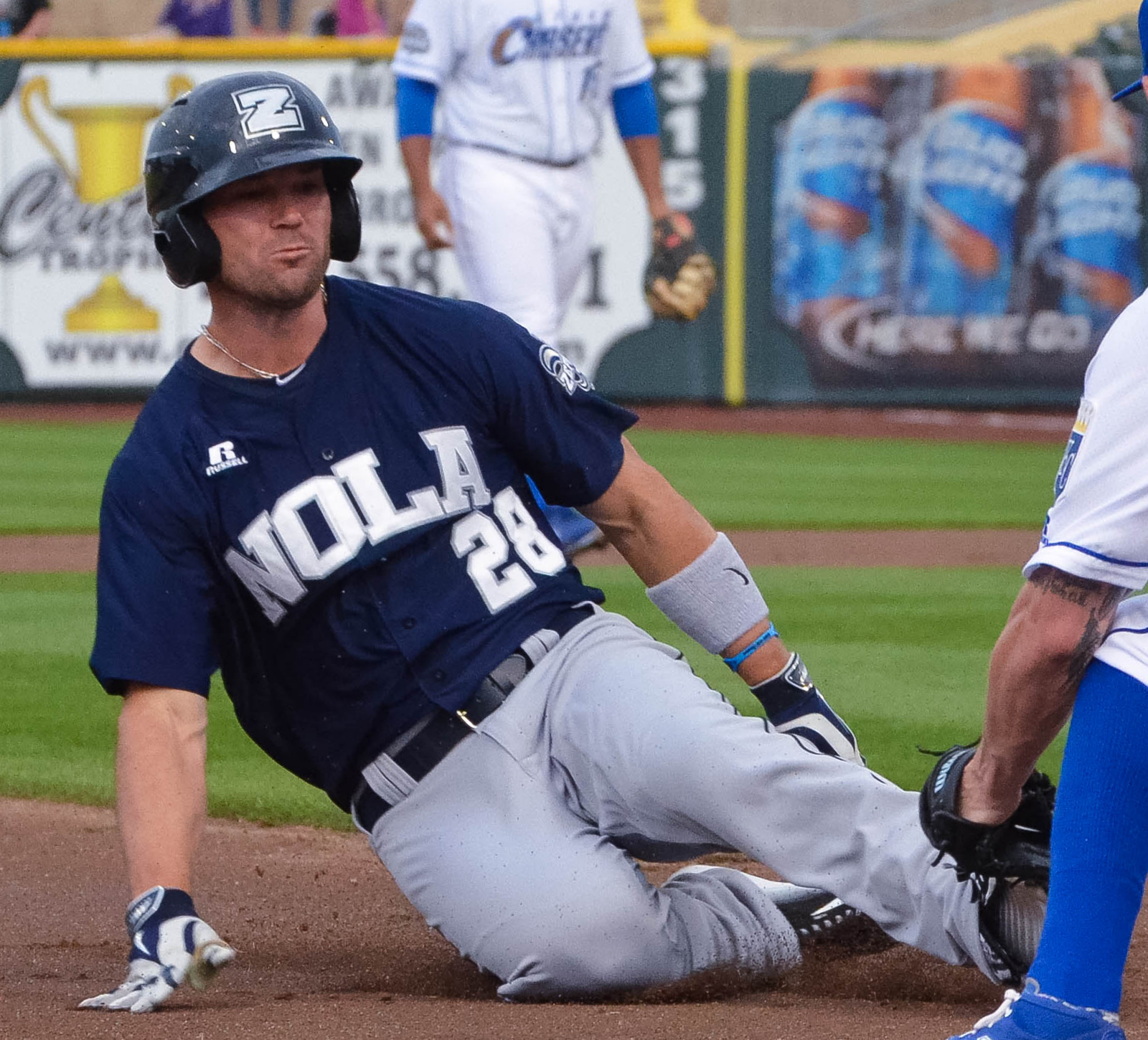 Cole Gillespie